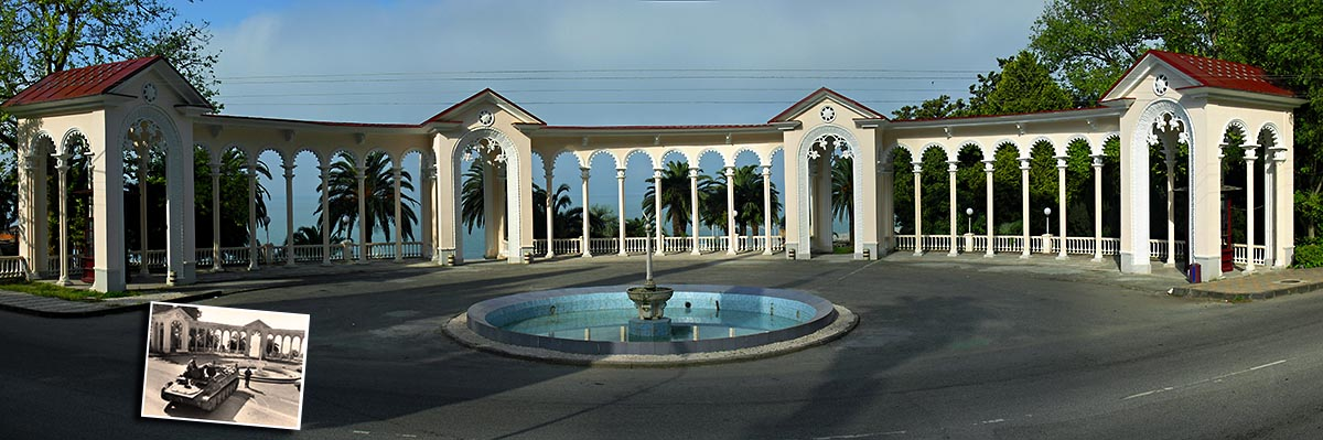 colonnade in Gagra, Abkhazia